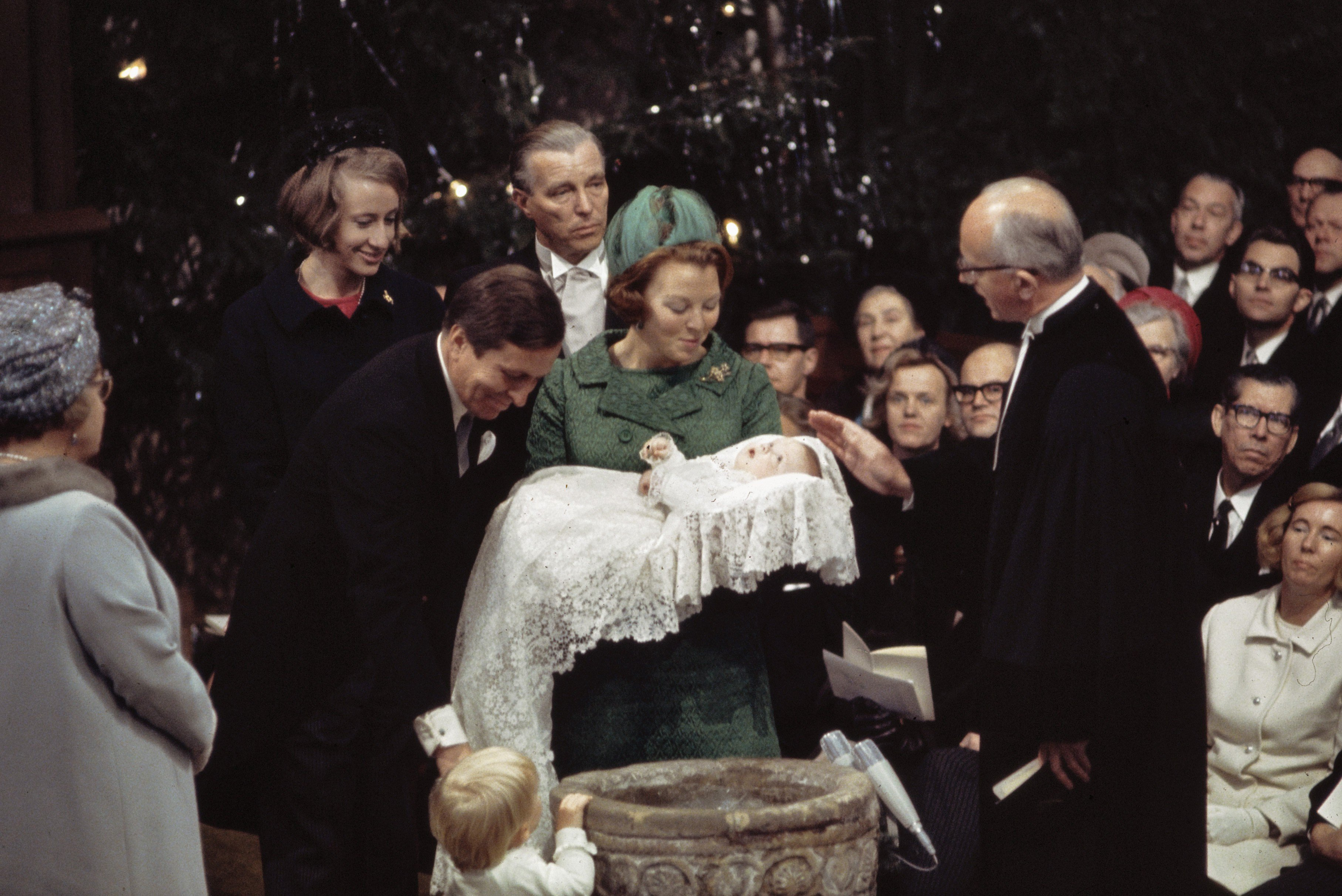 Collectie / Archief : Fotocollectie Anefo Reportage / Serie : [ onbekend ] Beschrijving : Doop Prins Johan Friso , Utrecht Datum : 28 december 1968 Locatie : Utrecht (stad) Trefwoorden : doop, koninklijke familie, monarchie, prinsen, prinsessen Persoonsnaam : Beatrix (prinses Nederland), Claus (prins Nederland), Johan Friso (prins Nederland) Fotograaf : Koch, Eric / Anefo Auteursrechthebbende : Nationaal Archief Materiaalsoort : Dia (kleur) Nummer archiefinventaris : bekijk toegang 2.24.01.06 Bestanddeelnummer : 254-8410